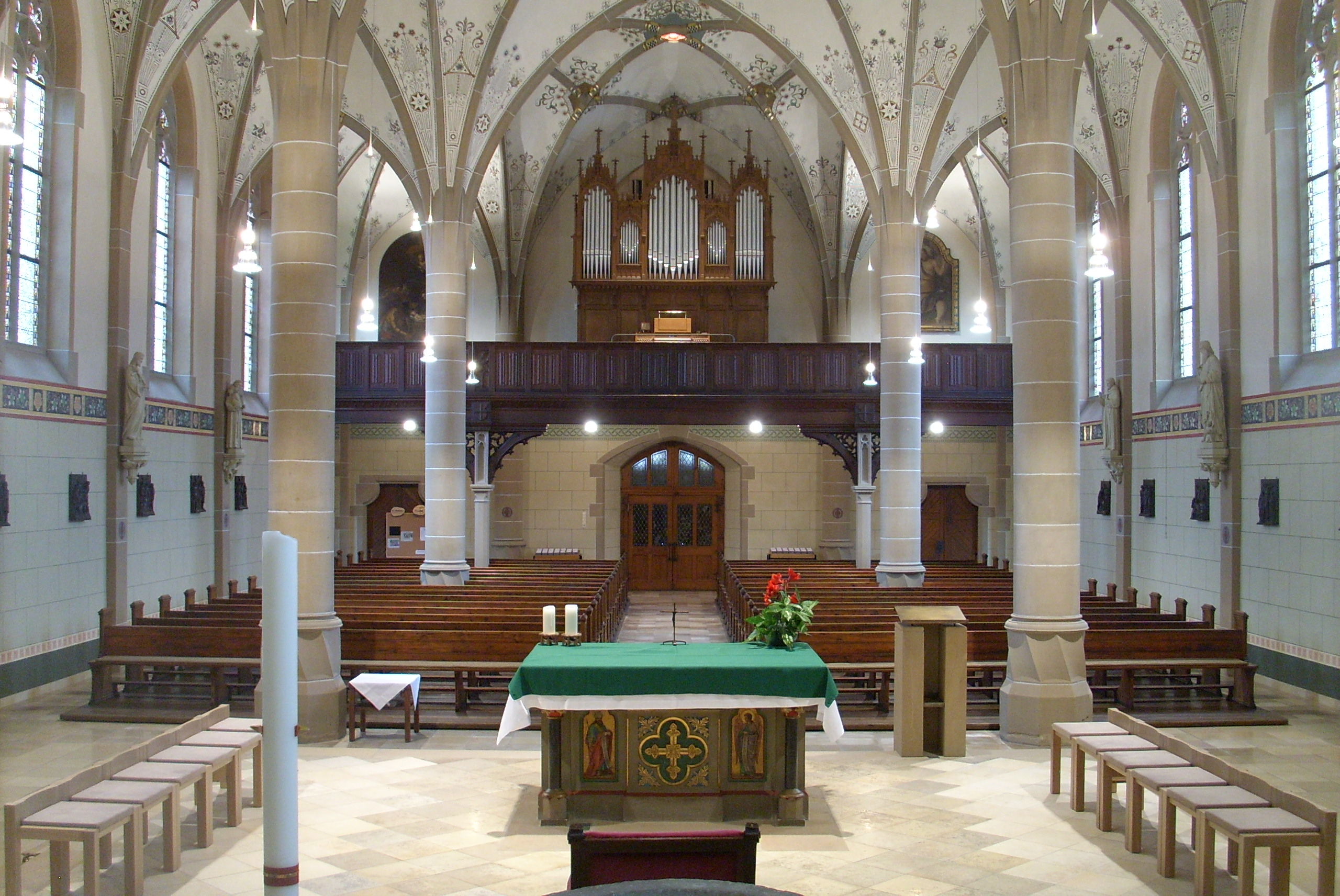 Innenraum Pfarrkirche St. Matthäus Bad Sobernheim